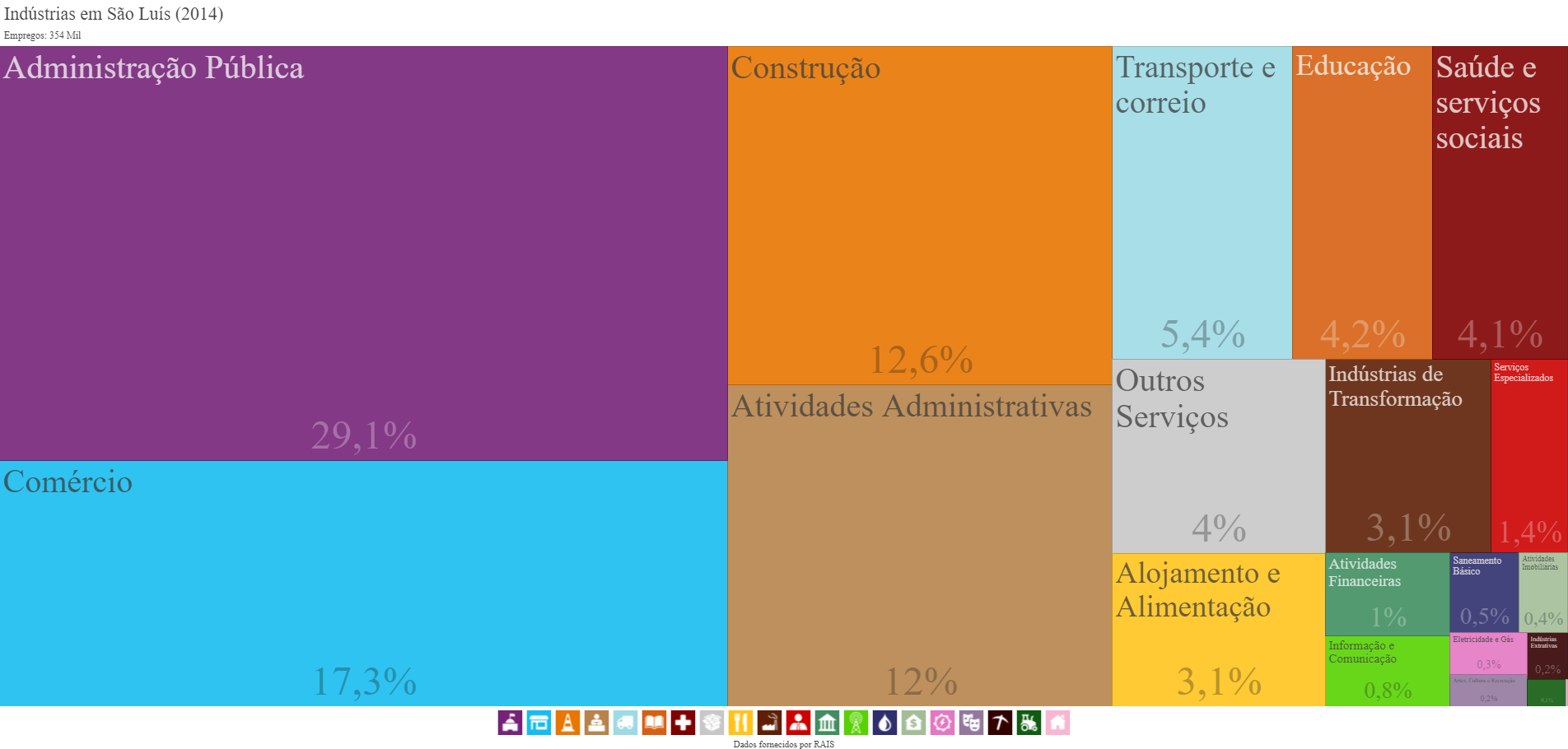 Coletado de